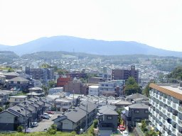 奈良県の生駒山